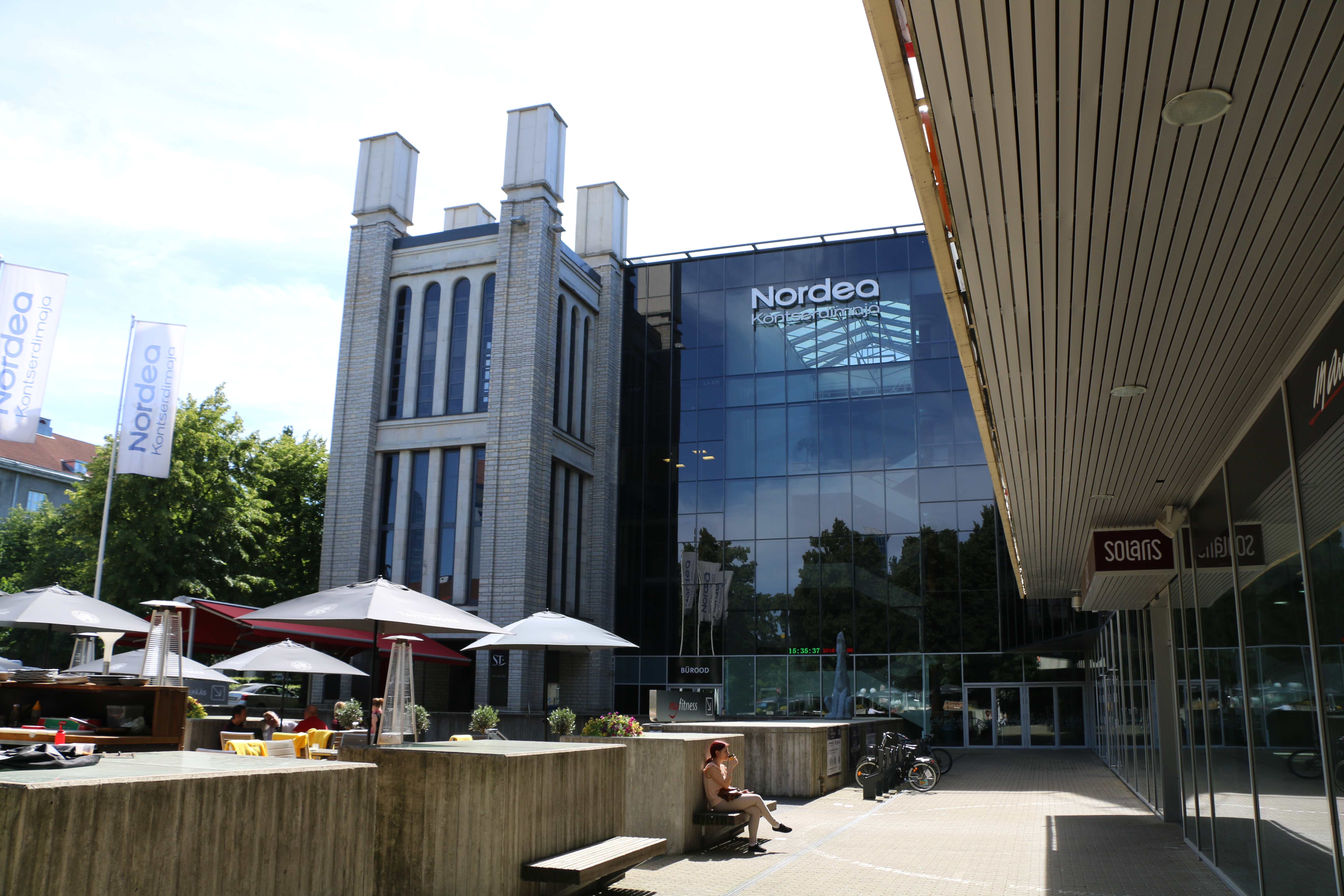 Nordea kontserdimaja